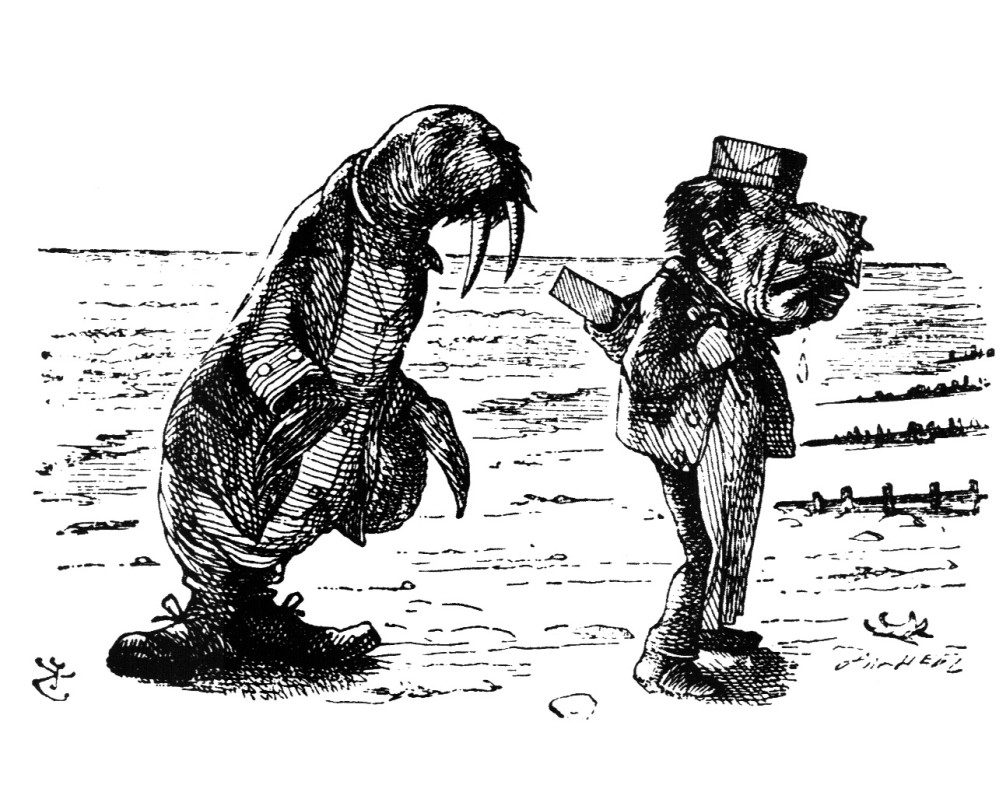 гравюра Джона Тенниела